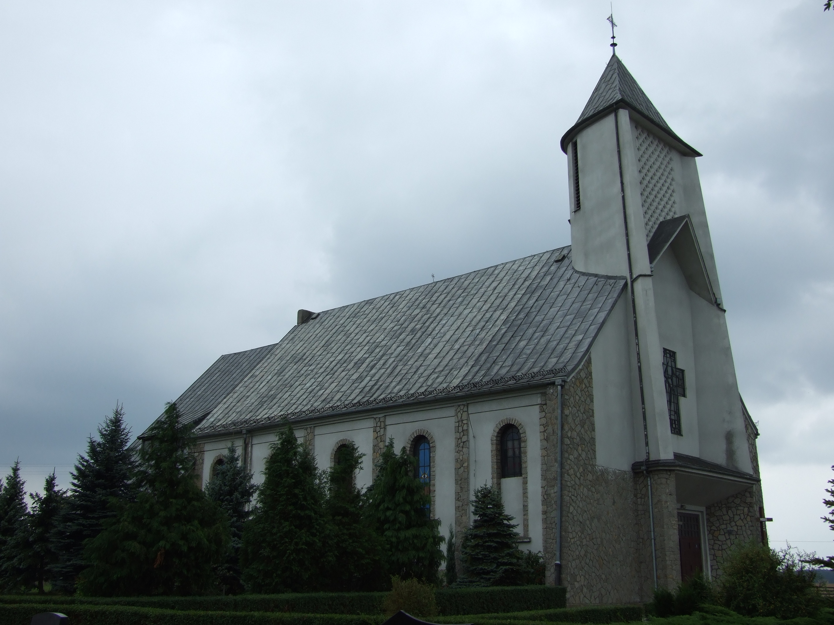 Kościół parafialny w Sowczycach